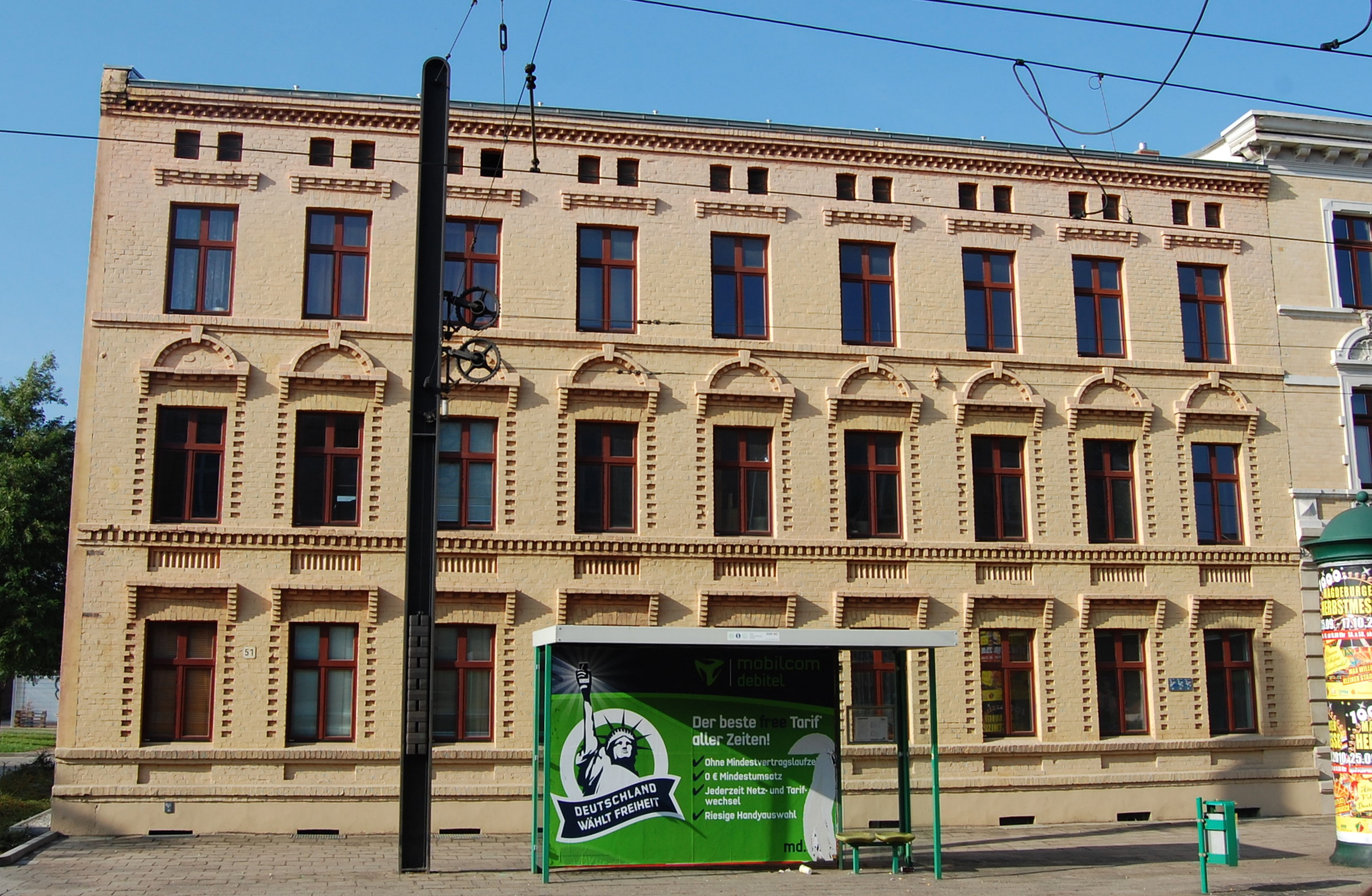 Alt Salbke 51 in Magdeburg-Westerhüsen